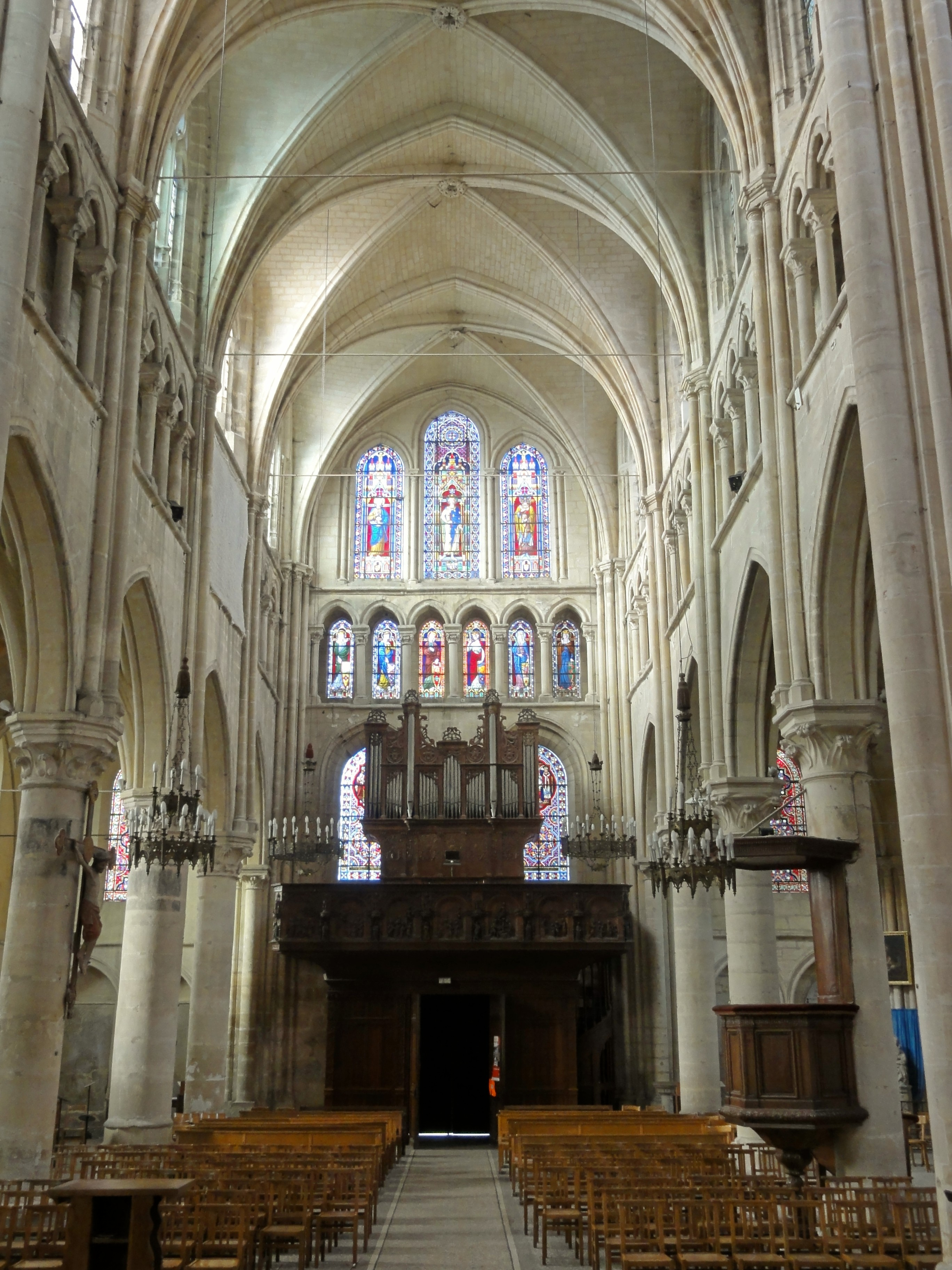 Intérieur de la nef : vue en direction du portail occdidental et de la tribune d'orgue.